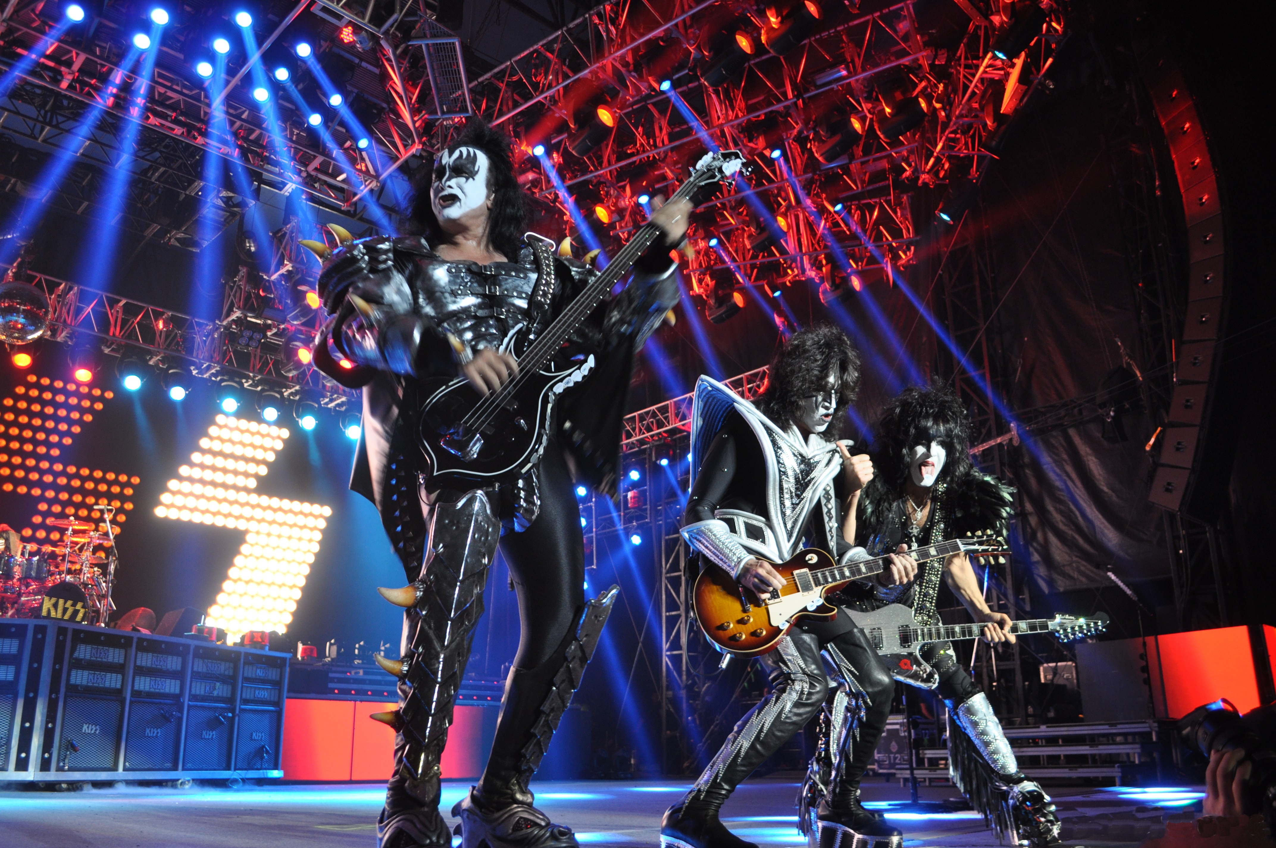 KISS -DSC_0089- 8.29.12